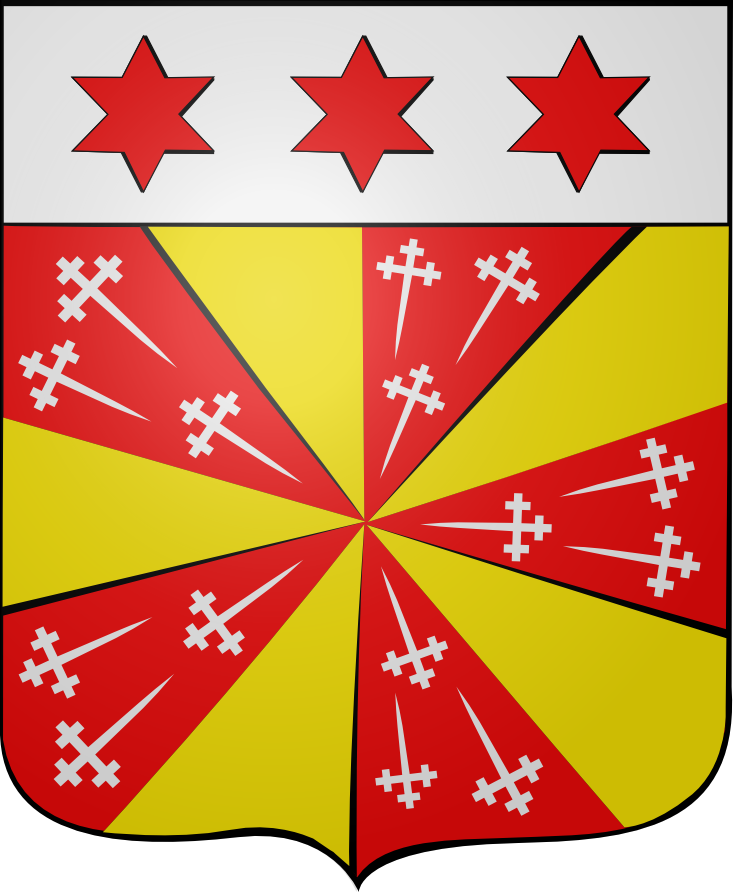 Gironné de gueules et d'or de dix pièces, chaque giron de gueules chargé de trois croix recroisettées au pied fiché d’argent ; au chef d’argent chargé de trois étoiles à six rais de gueules.